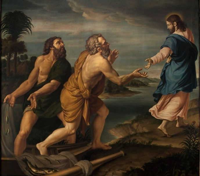 "La vocazione degli apostoli Pietro e Andrea", olio su tela, Duomo di Mantova. E' la copia di una tela del pittore del XVI secolo Fermo Ghisoni